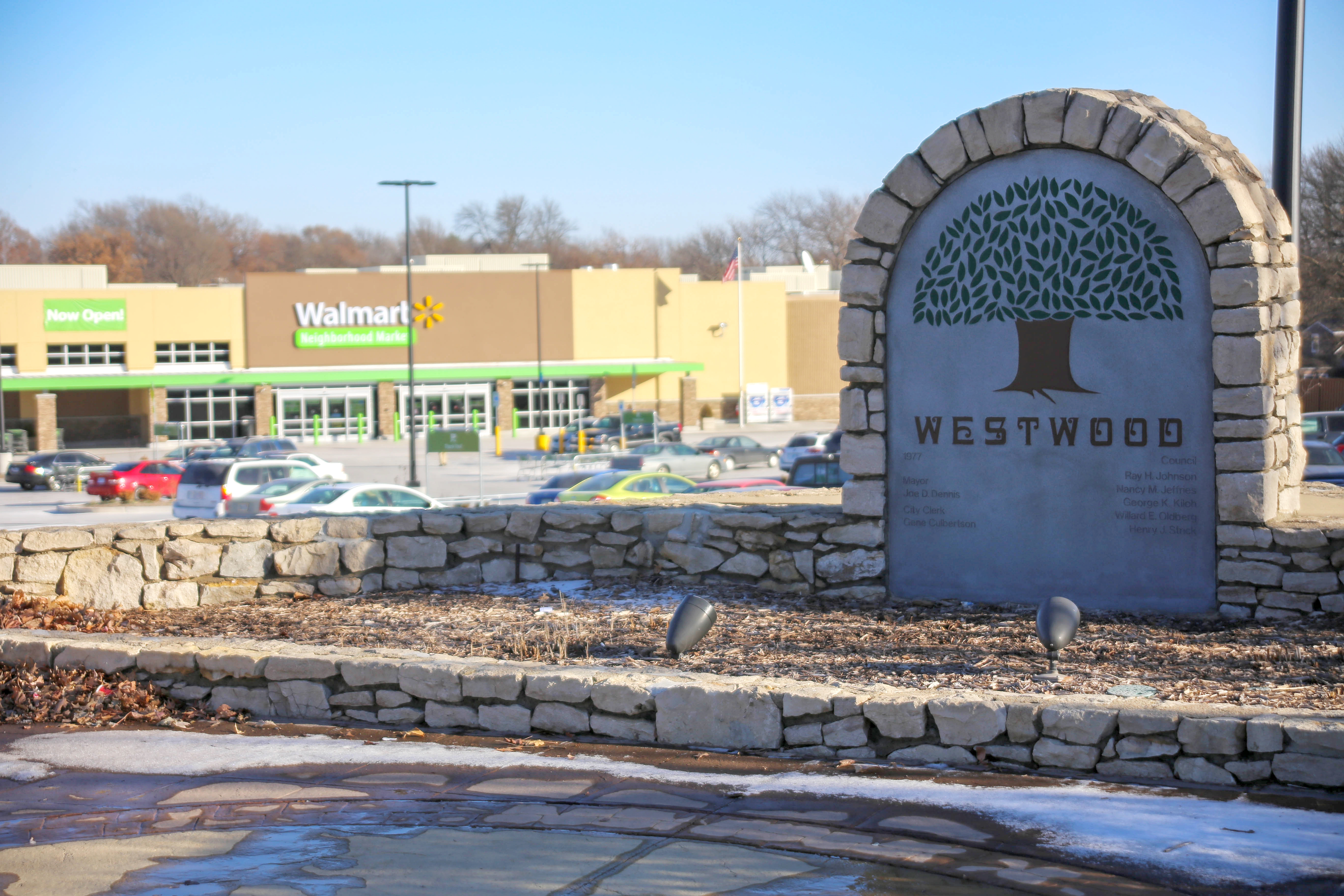 Welcome sign, Westwood, Kansas